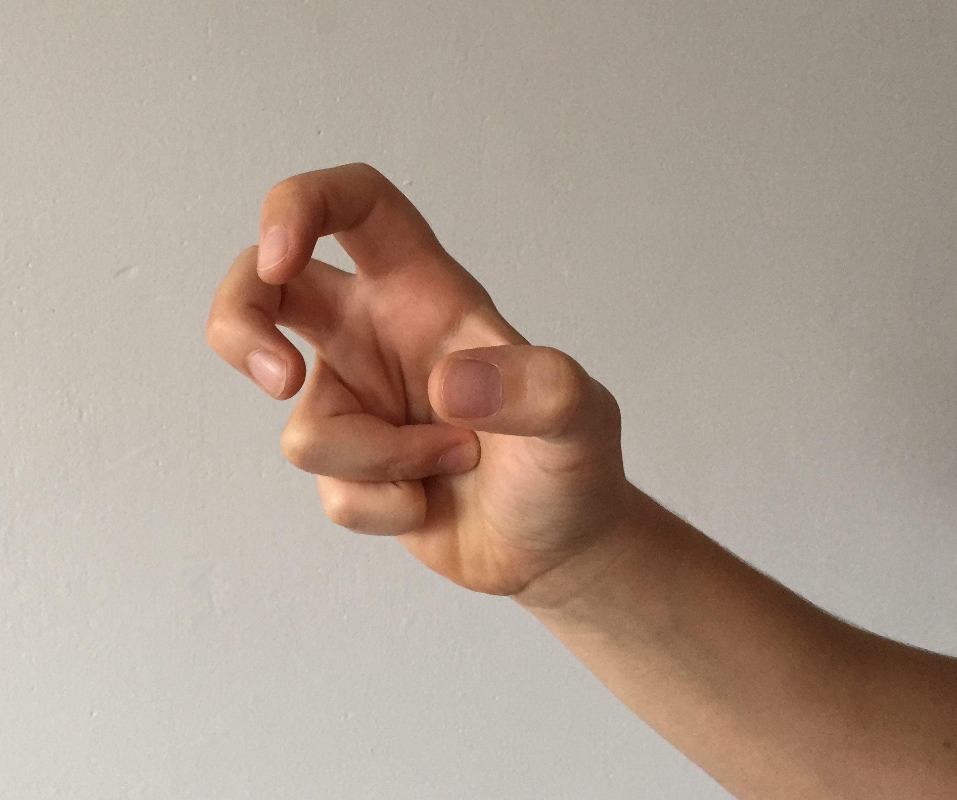 Style du dragon en Kung Fu